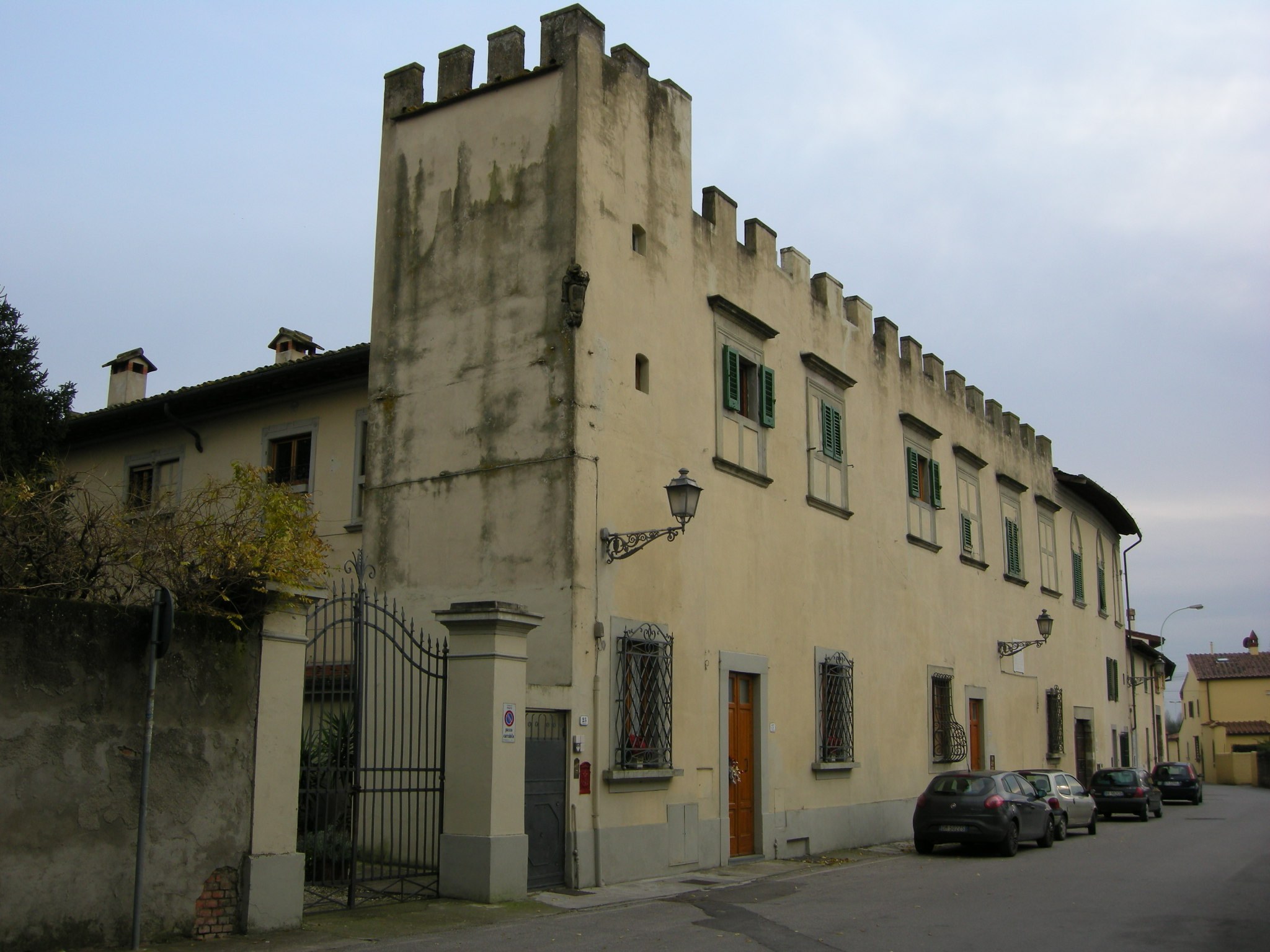 Villa martini prato